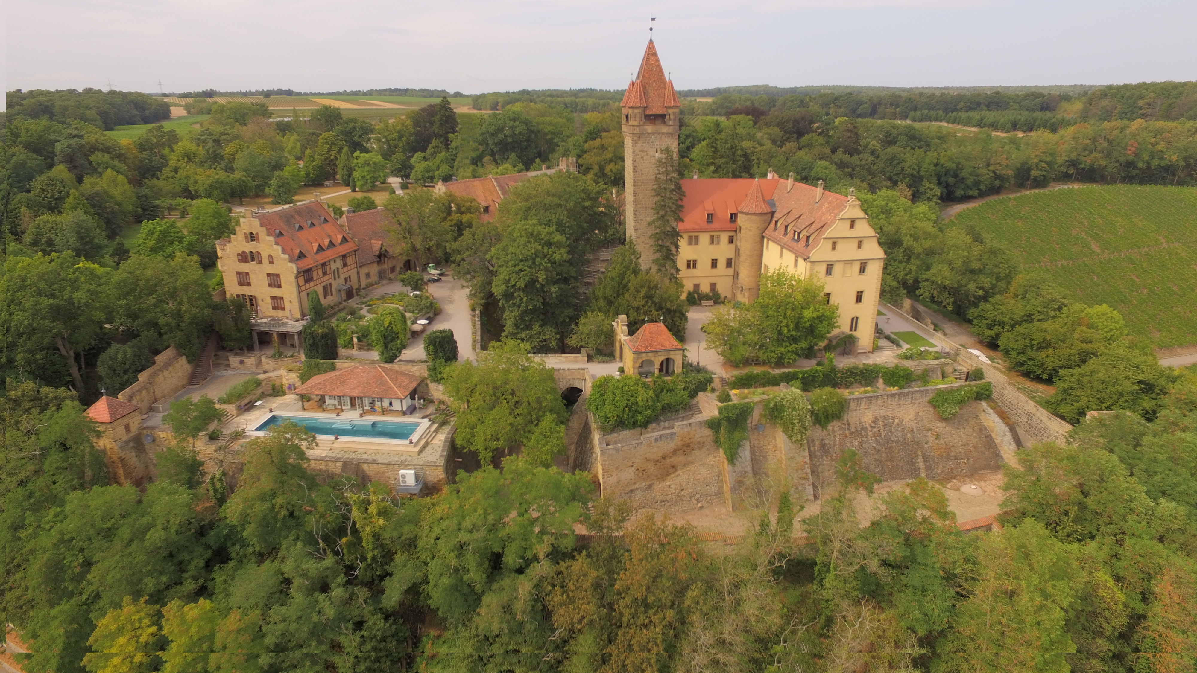 Luftaufnahme Schloss Stocksberg und das prachtvolle Anwesen aus südlicher Richtung